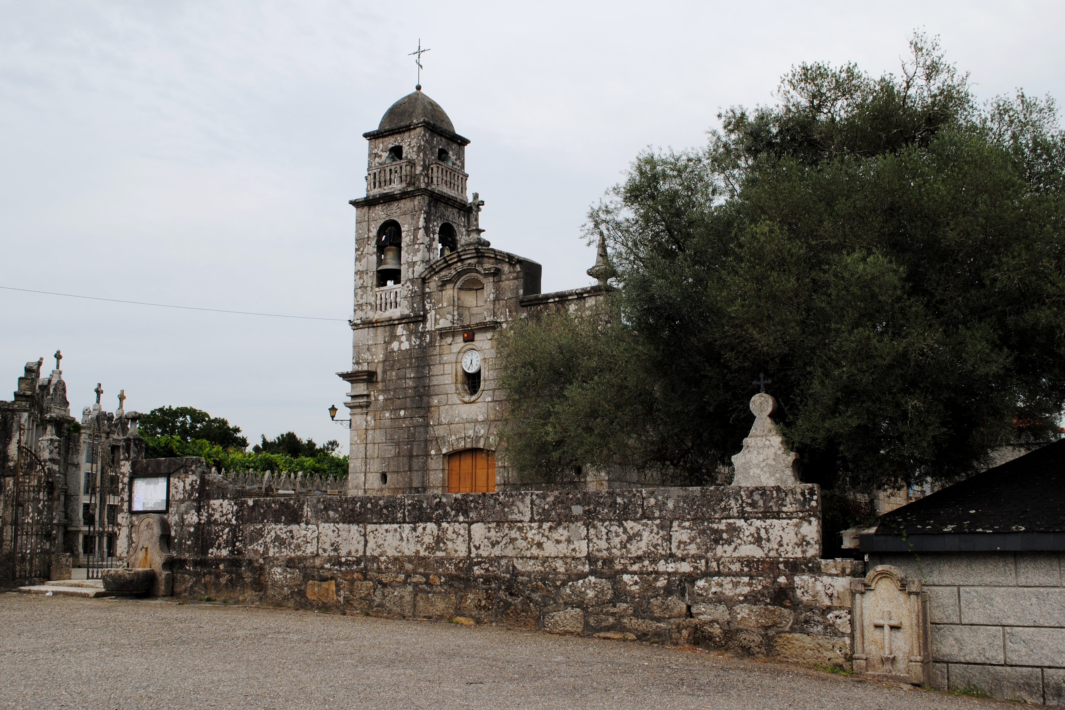 O Porriño, Mosende, S. Xurxo.